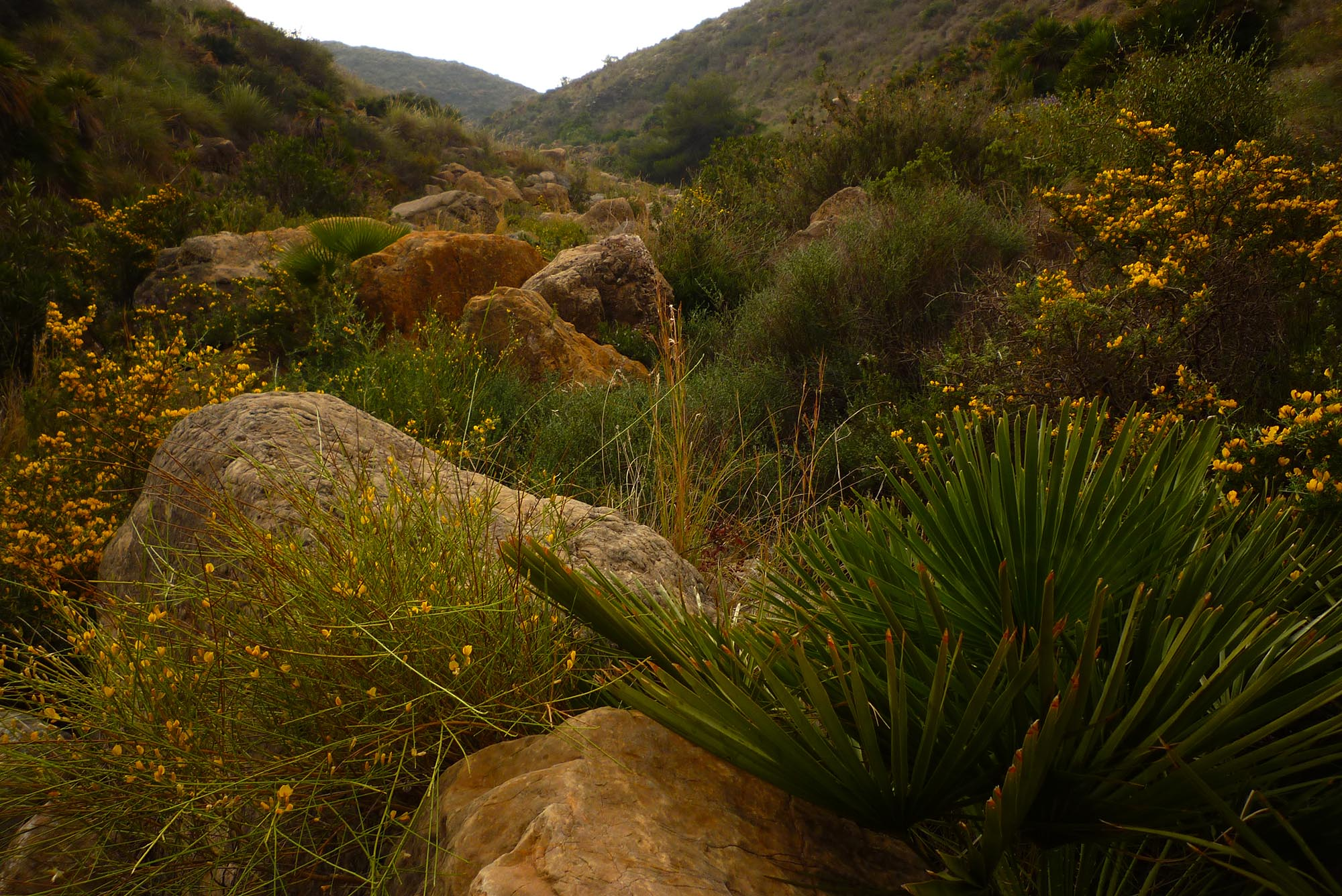 Paisaje inframediterráneo, en una rambla en Cabo Tiñoso, Cartagena, España.